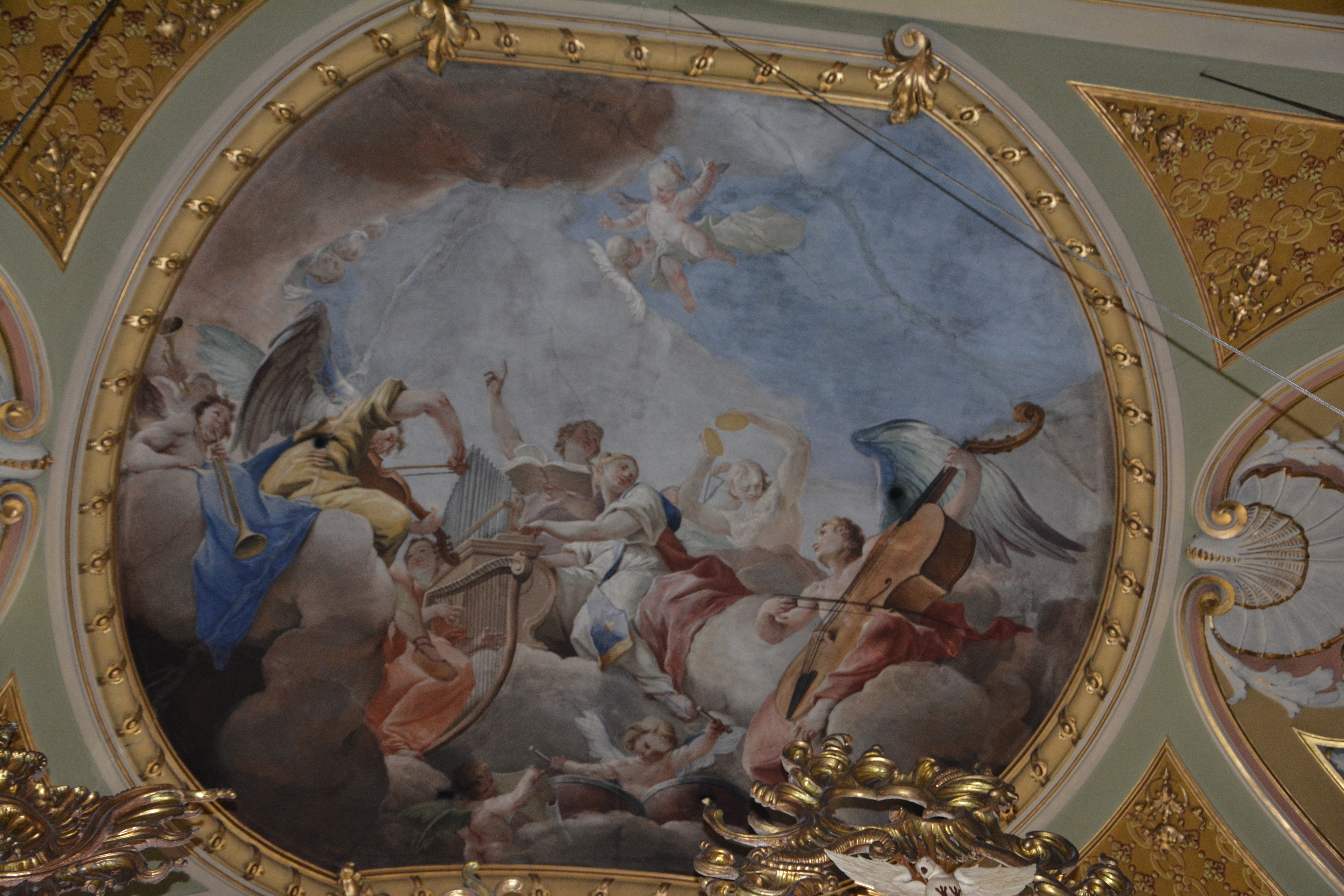 Deckenfresko von Paul Troger im Brixner Dom (1748-50): Das Engelskonzert